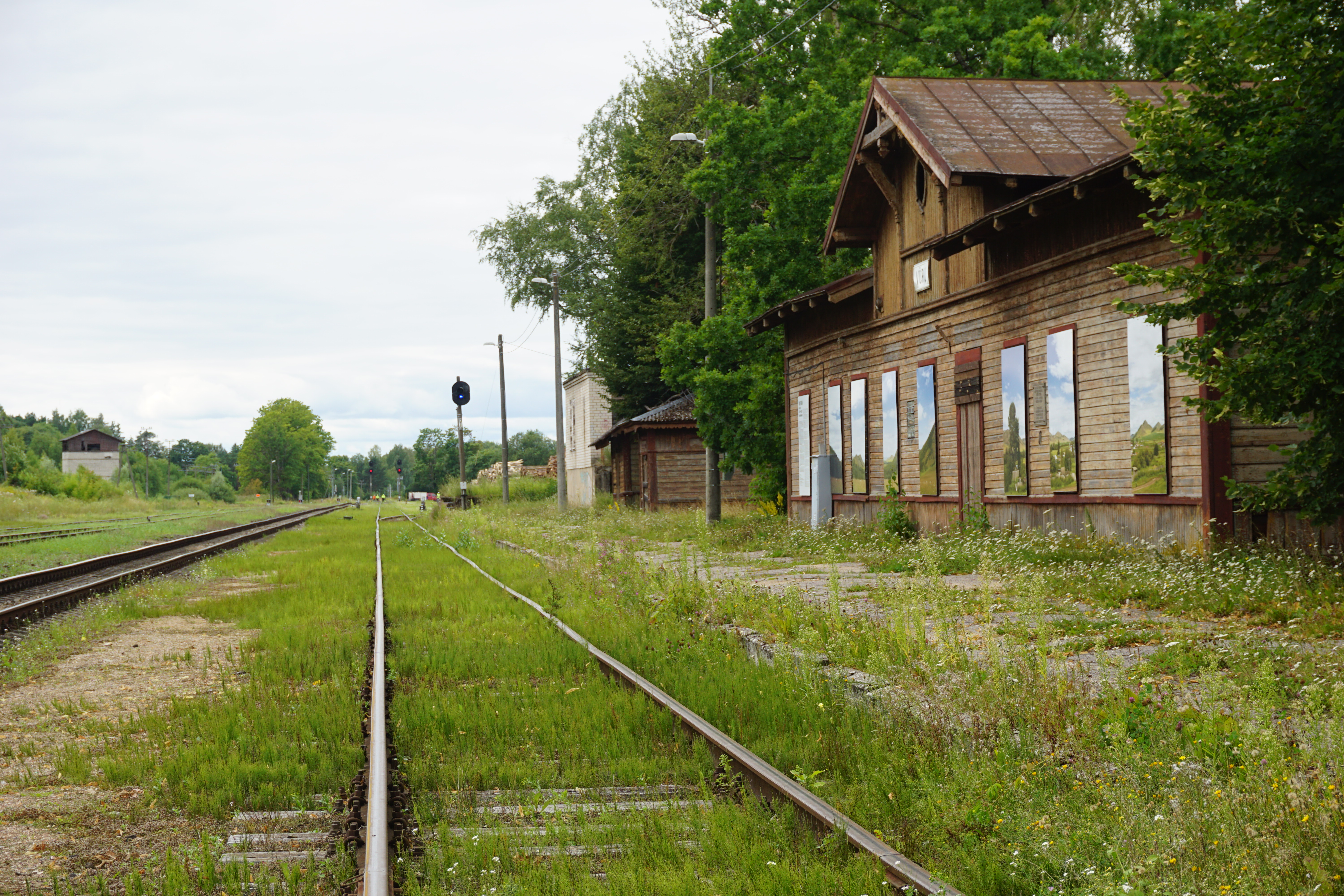 Võru raudteejaam